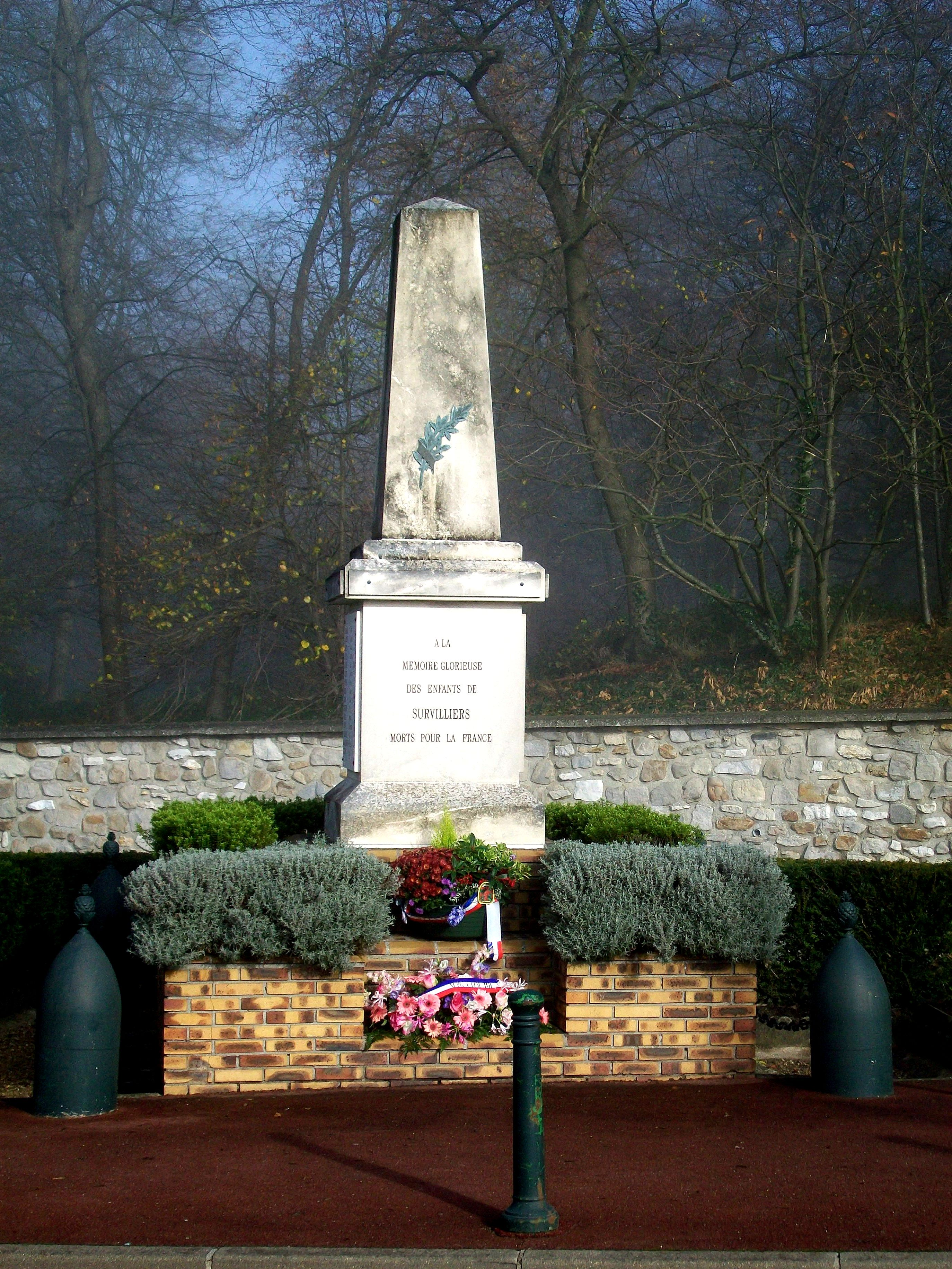 Monument aux morts de Survilliers (95).